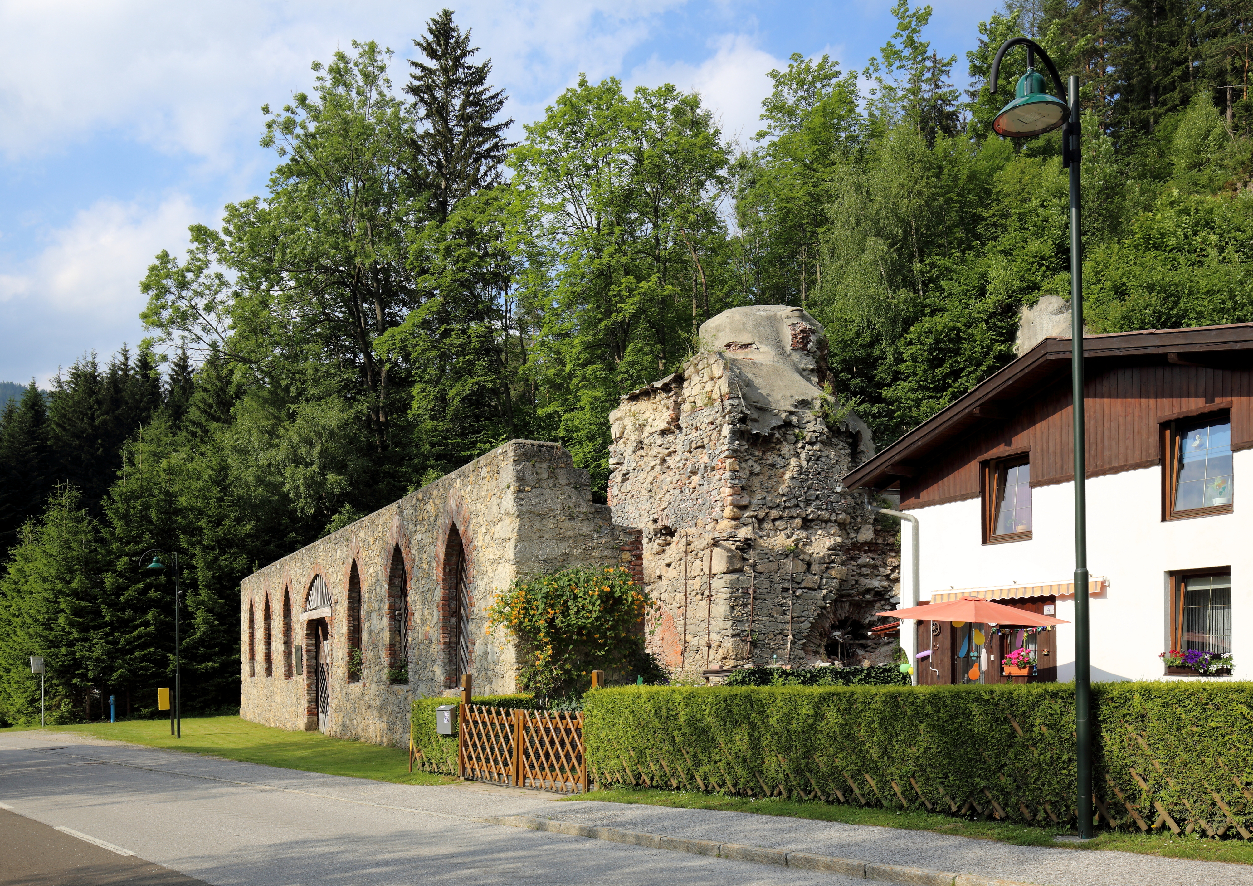 Die Alfredhütte in Steinhaus am Semmering, ein Ortsteil der österreichischen Gemeinde Spital am Semmering im Bezirk Bruck-Mürzzuschlag in der Steiermark. Die Hütte im „Industriegotik-Stil“ mit Spitzbogenfenstern wurde 1838/1839 im Auftrag von Alfred Fürst von Schönburg-Hartenstein errichtet, produzierte bis zu 3000 Tonnen Roheisen pro Jahr und wurde 1885 stillgelegt.